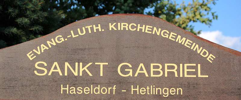 Schild SanktGabriel in Hetlingen